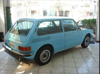 Volkswagen Brasília